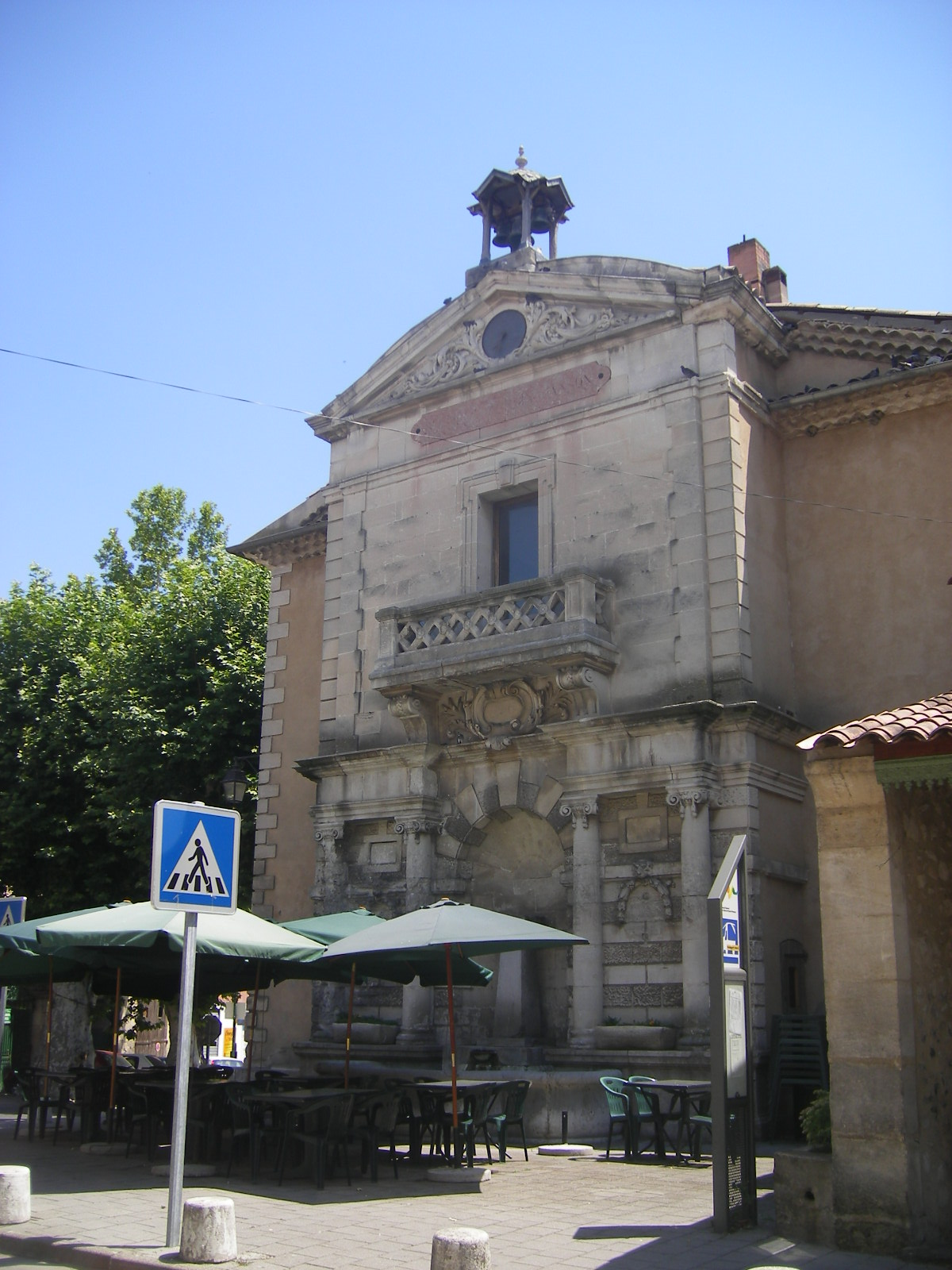 Mane